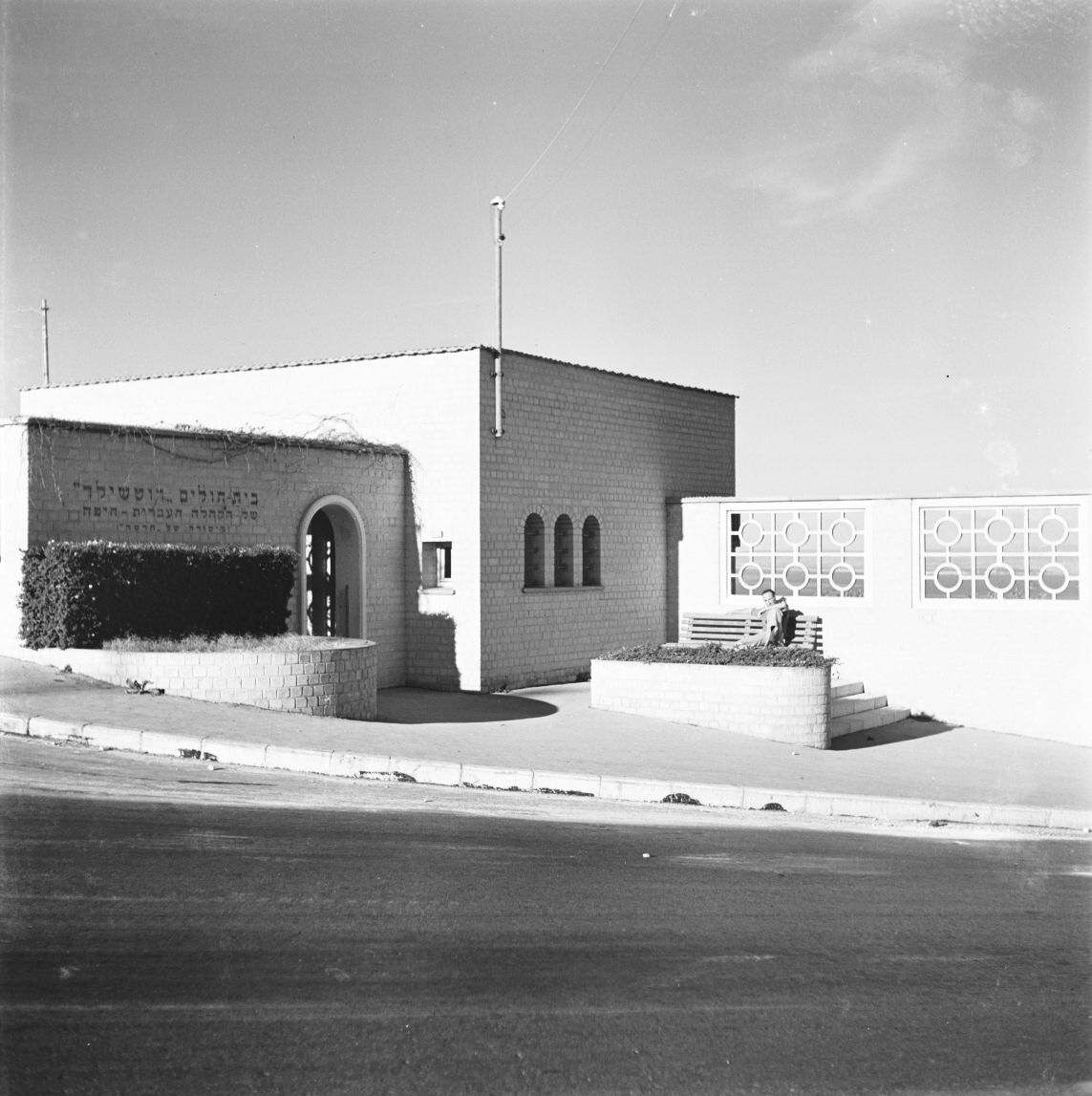 אוסף צילומים של הצלם זולטן קלוגר טווח מספרי התשלילים 30890 - 30999: חיפה - הדר הכרמל